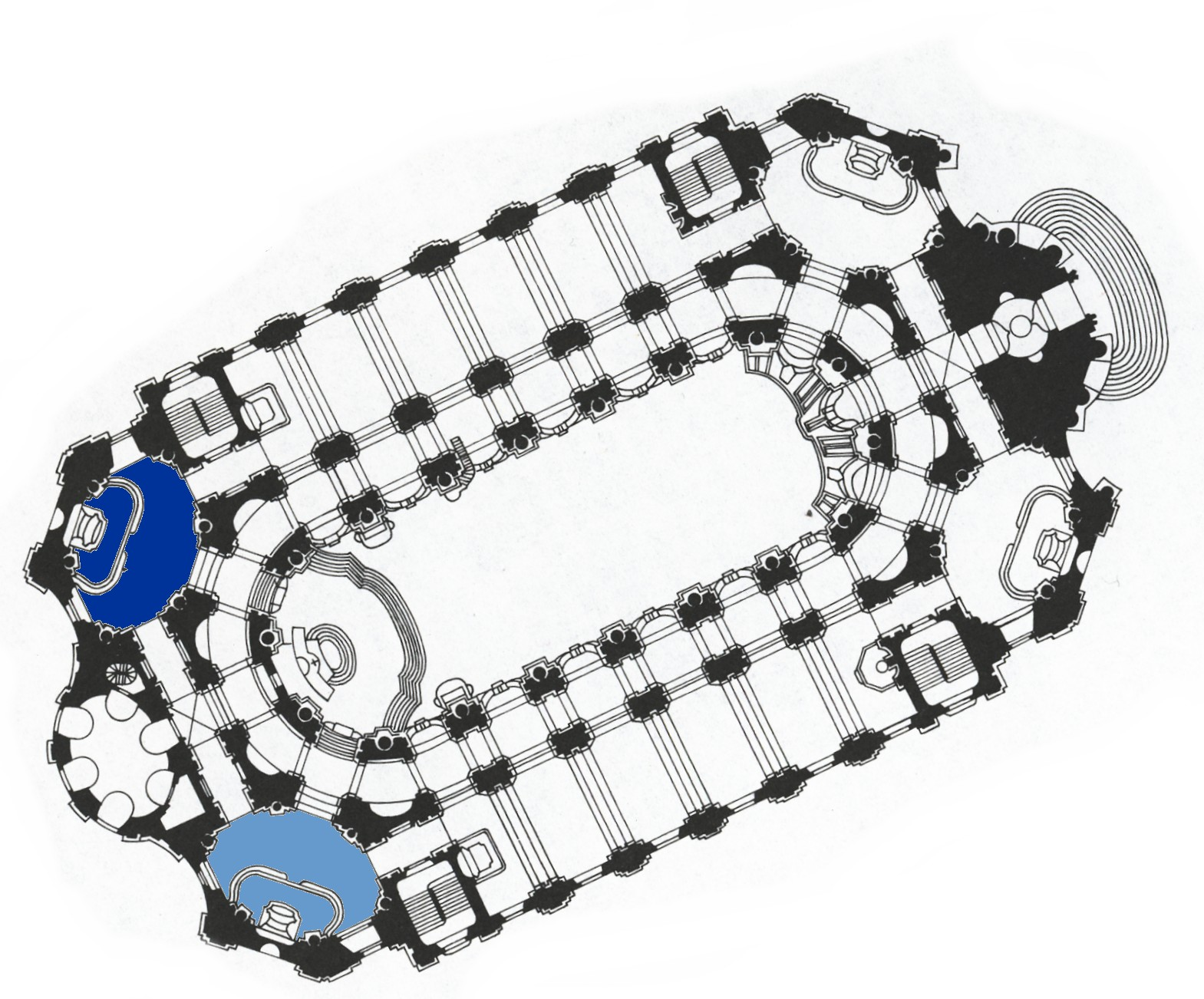 genordeter Grundriss der Katholischen Hofkirche in Dresden, eingefärbt sind die Sakramentskapelle (hellblau) und die Kreuzkapelle (dunkelblau)